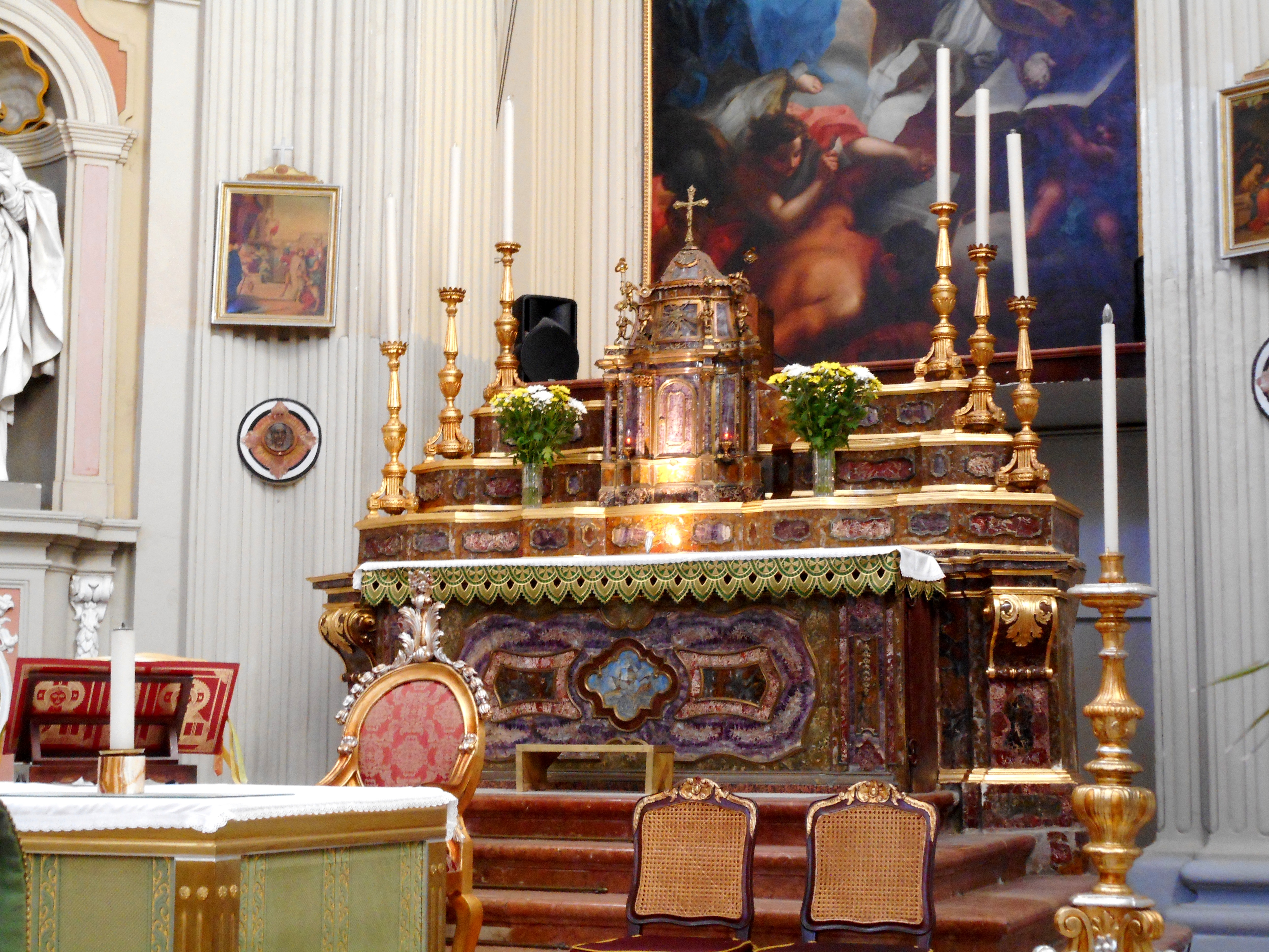 Altare maggiore della chiesa di Santa Teresa alla Kalsa